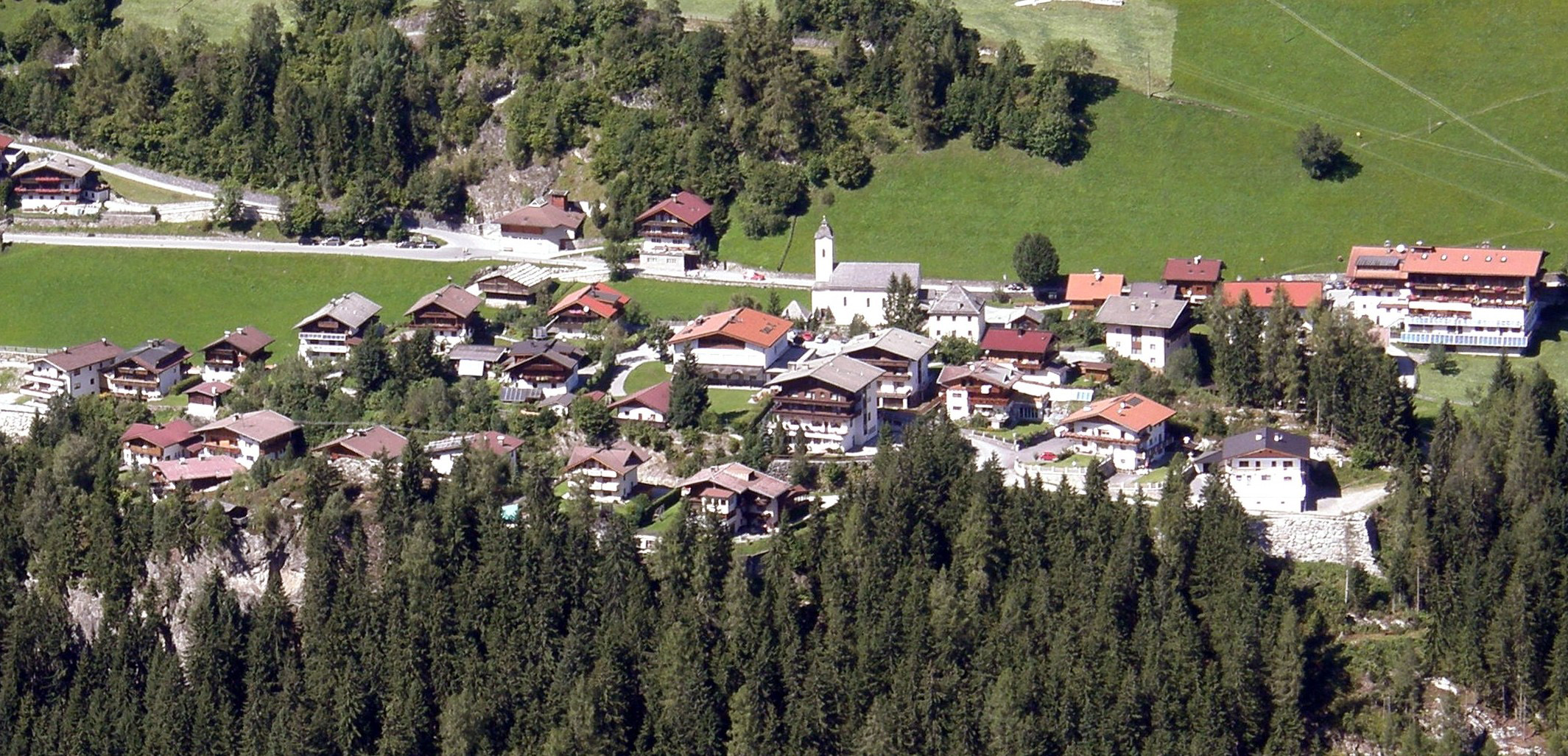 Brandberg, Hauptort der gleichnamigen Gemeinde in Tirol, Österreich. Aufnahme von der gegenüberliegenden Talseite.